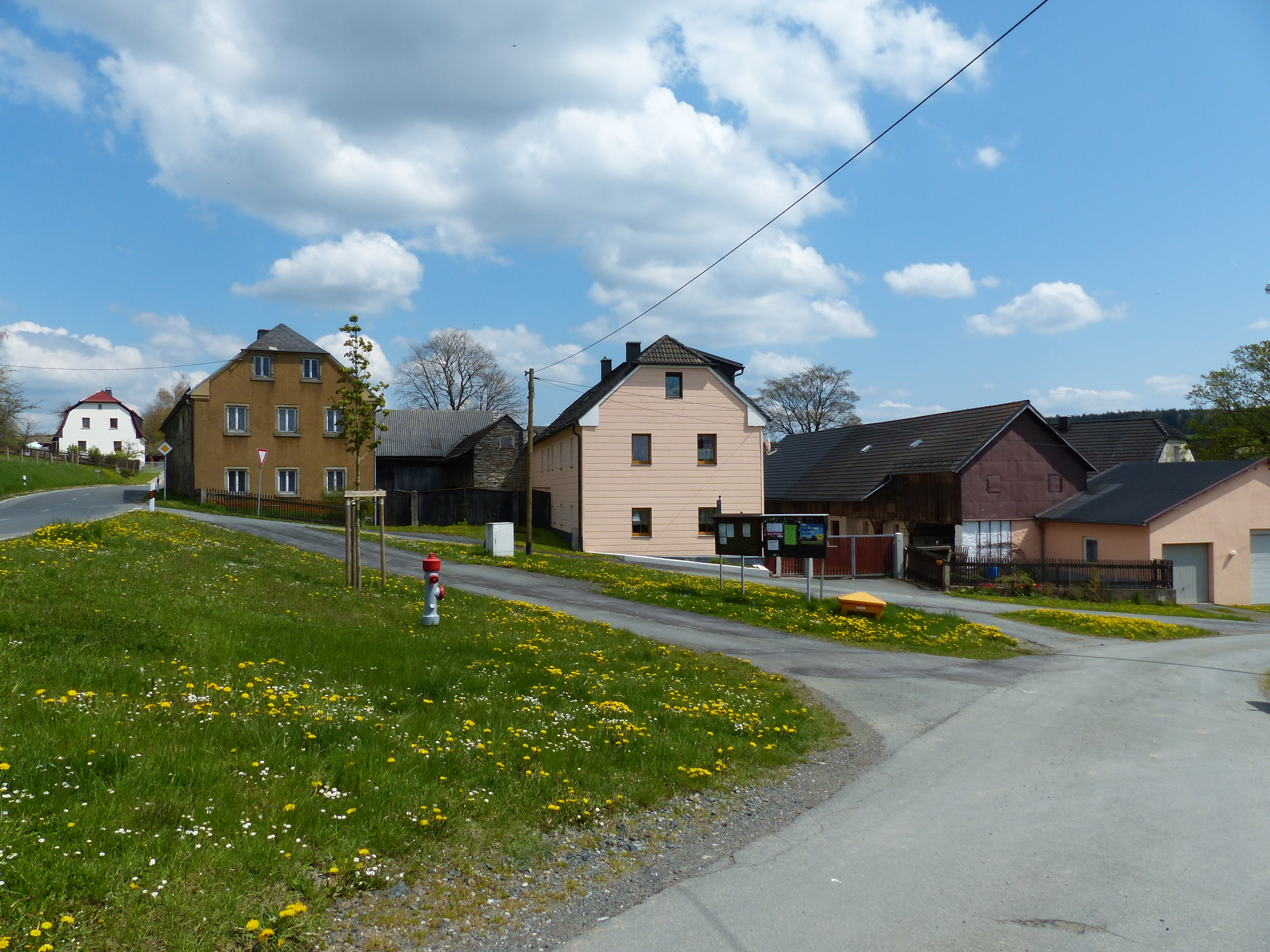 Serie Ortsansichten, Baudenkmäler in den Ortsteilen, Landschaft im Gemeindegebiet Regnitzlosau